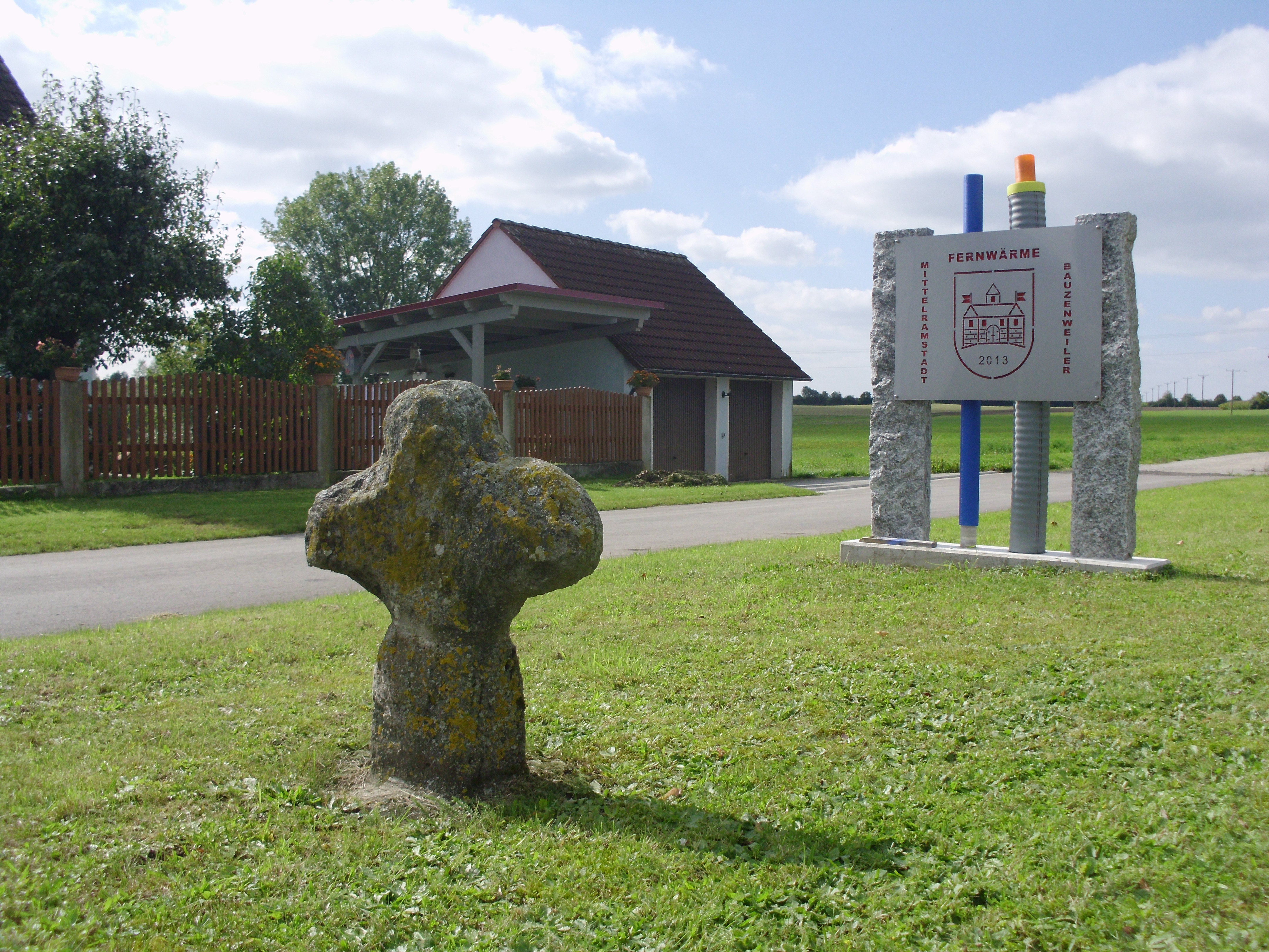 Mittelramstadt, Ortsteil von Leutershausen im Landkreis Ansbach, Steinkreuz und Erinnerungstafel an Fernwärme-Anschluss